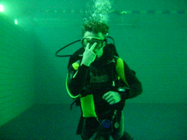 Κοίτα...